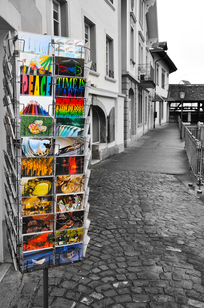 20100206-DSC_2803